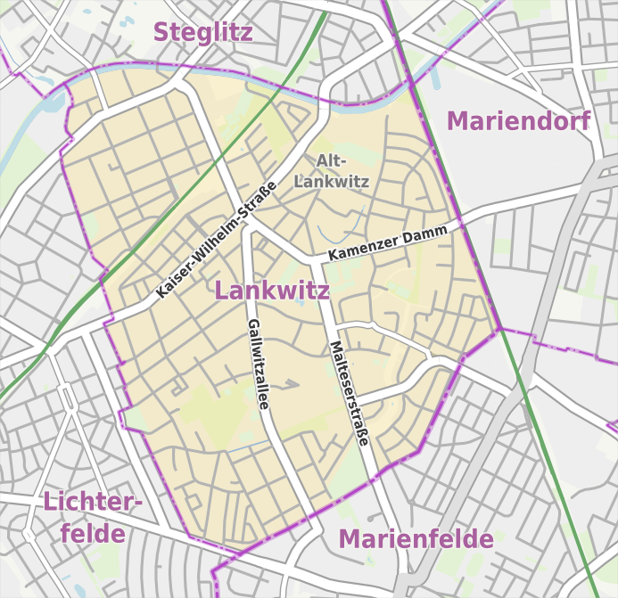 Übersichtskarte der Straßen und Ortslagen in Berlin-Lankwitz